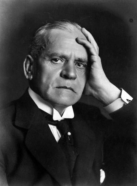 Albin Lavén